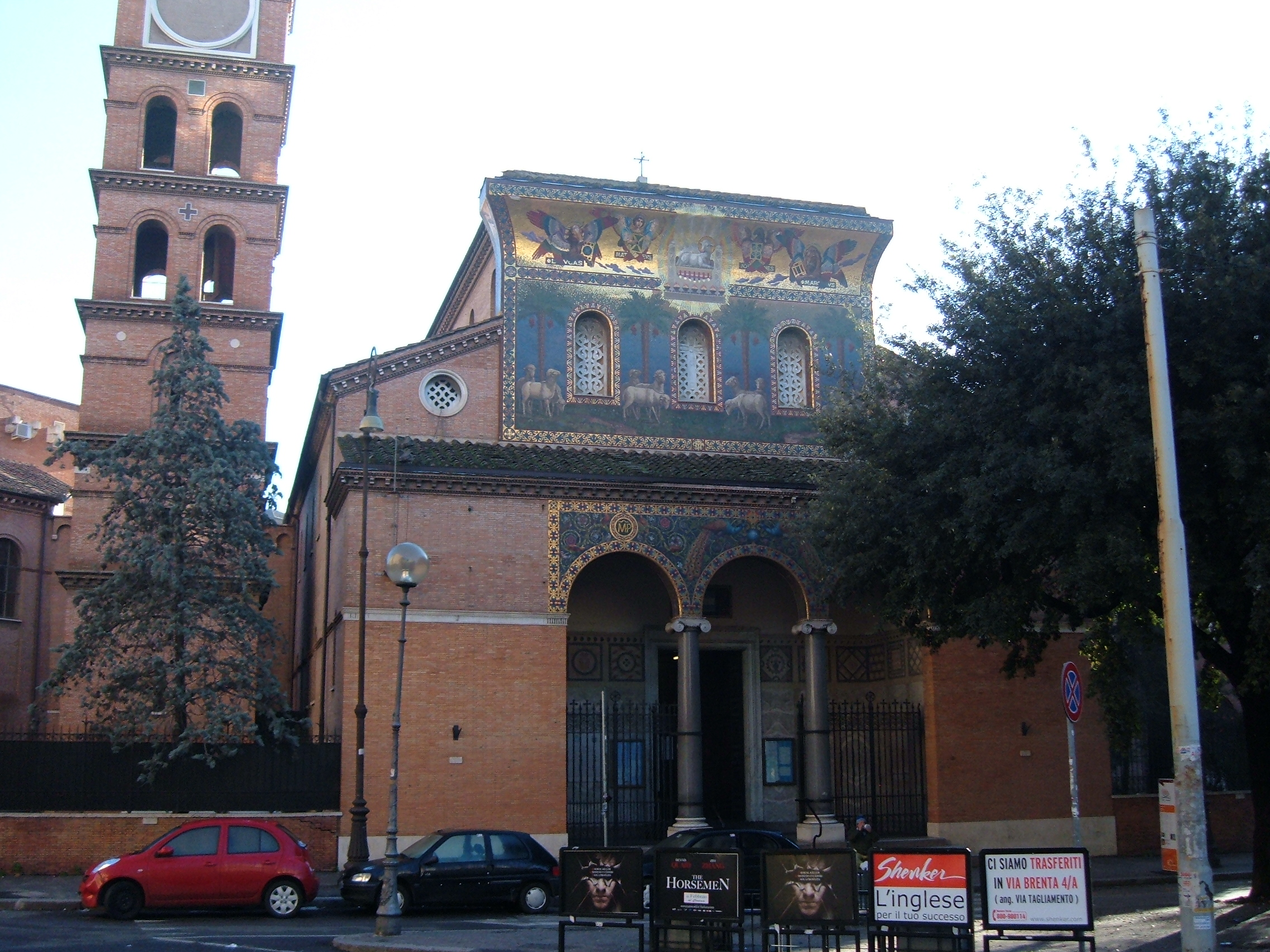 Chiesa di Santa Maria Addolorata a piazza Buenos Aires, a Roma, nel quartiere Trieste.